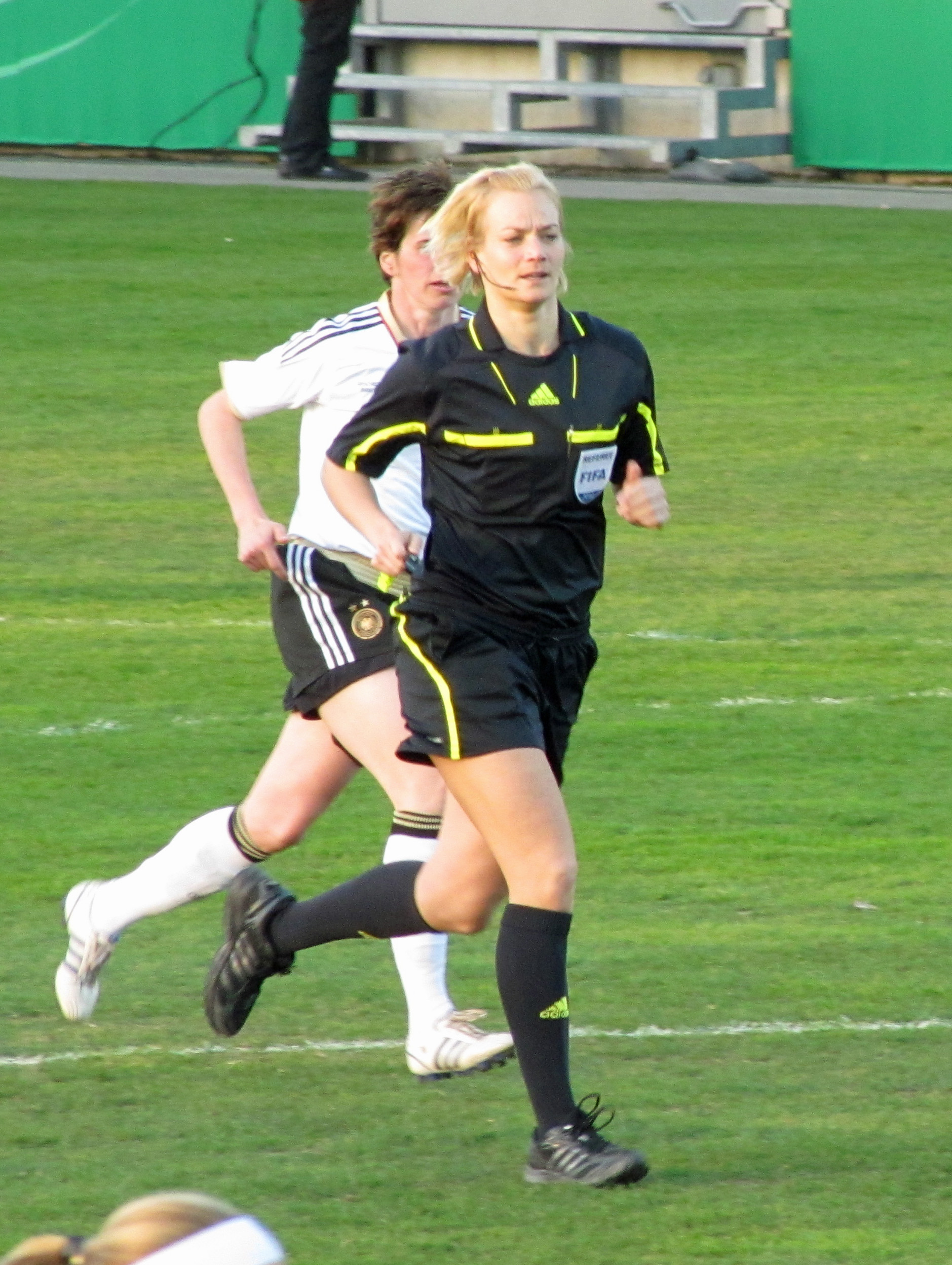 DFB-Abschiedsspiel für Birgit Prinz im Volksbank-Stadion in Ffm. Szene mit Bibiana Steinhaus als Schiedsrichterin.